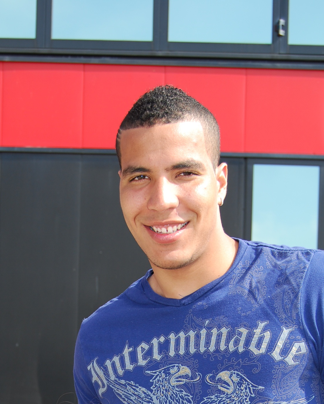 Deze foto van Esteban heb ik gemaakt na afloop van de training van AZ Alkmaar op 17 april 2011